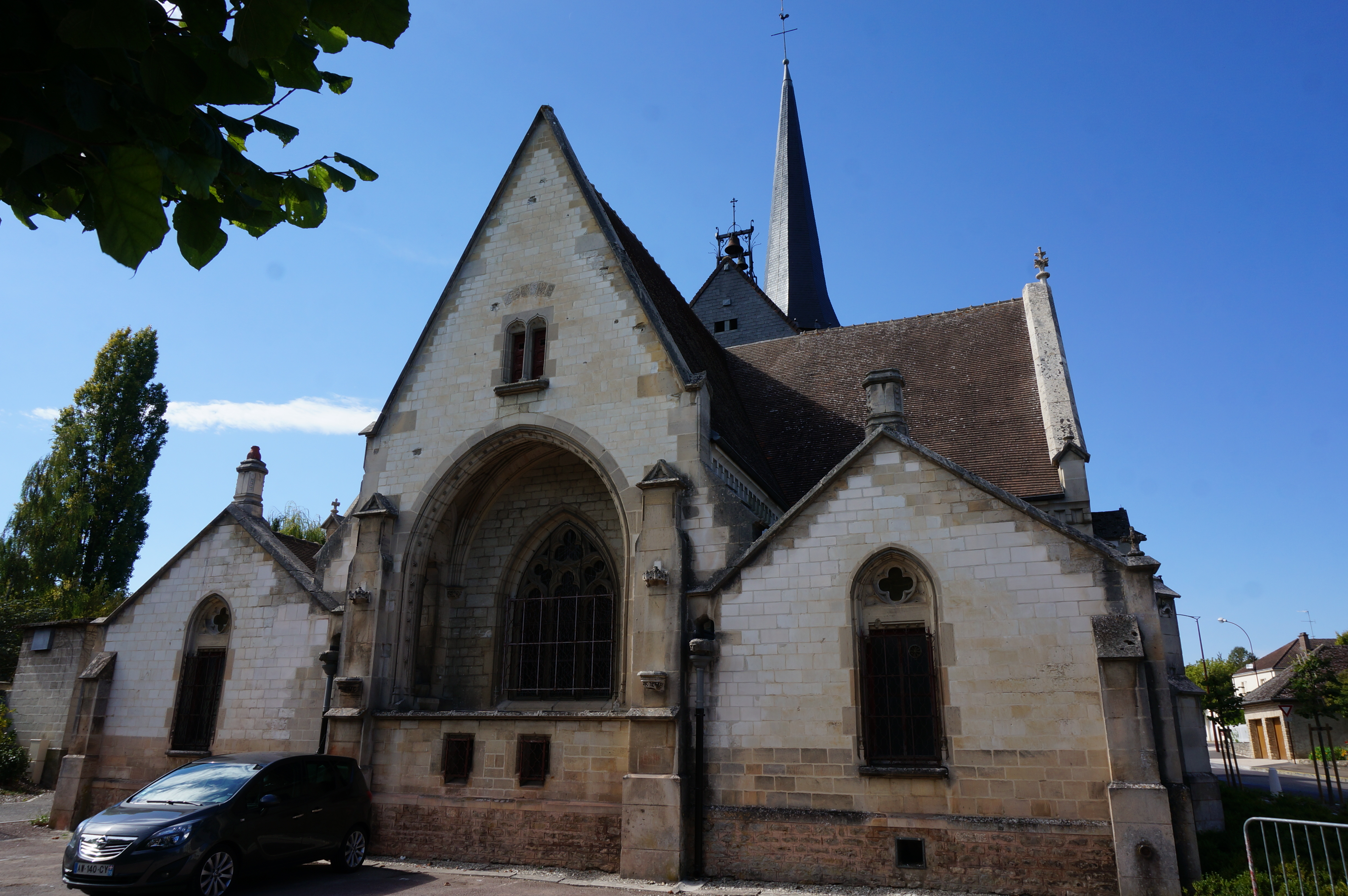 Église Saint-Julien-de-Brioude .